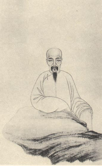 江声，清代学者。Jiang Sheng